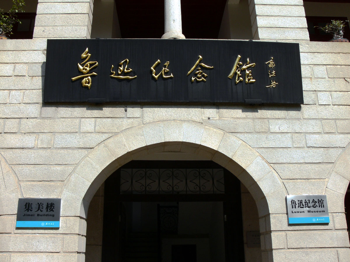 Luxun Museum in Xiamen U 厦门大学鲁迅纪念馆